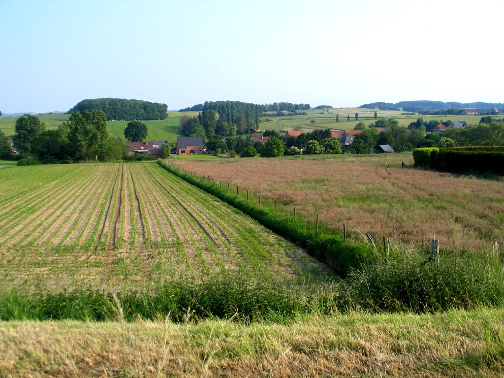 De omgeving van Kaggevinne in het Hageland - eigen foto